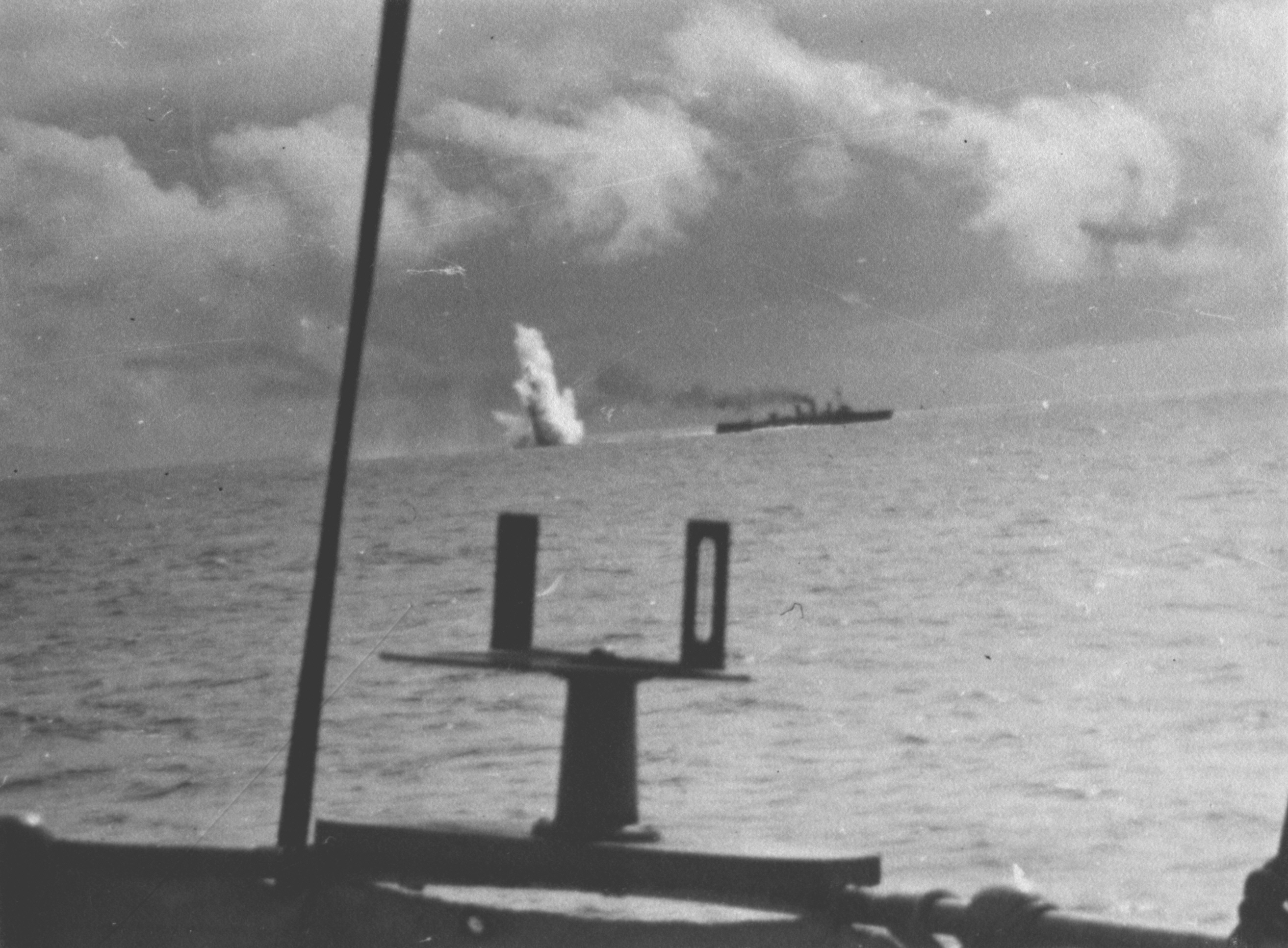 Arquivo liberado pela Marinha do Brasil através de projeto GLAM com Wiki Educação Brasil